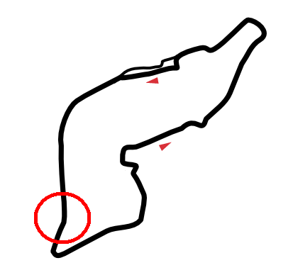 Autodromo Enzo e Dino Ferrari, Imola (1992 Layout) Villeneuve Curva highlighted